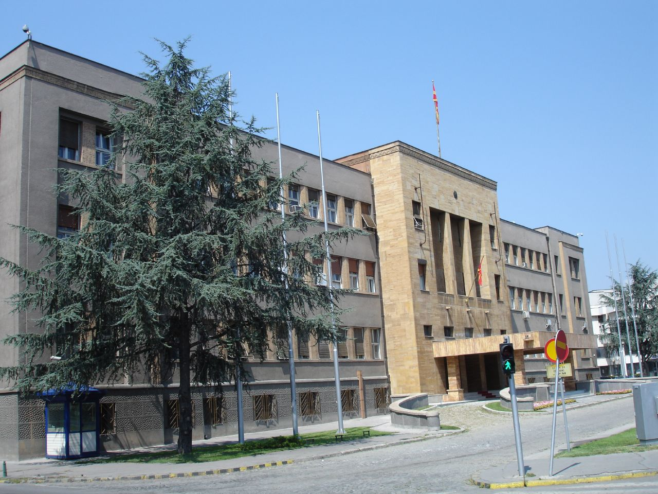 Зградата на Собранието на Република Македонија